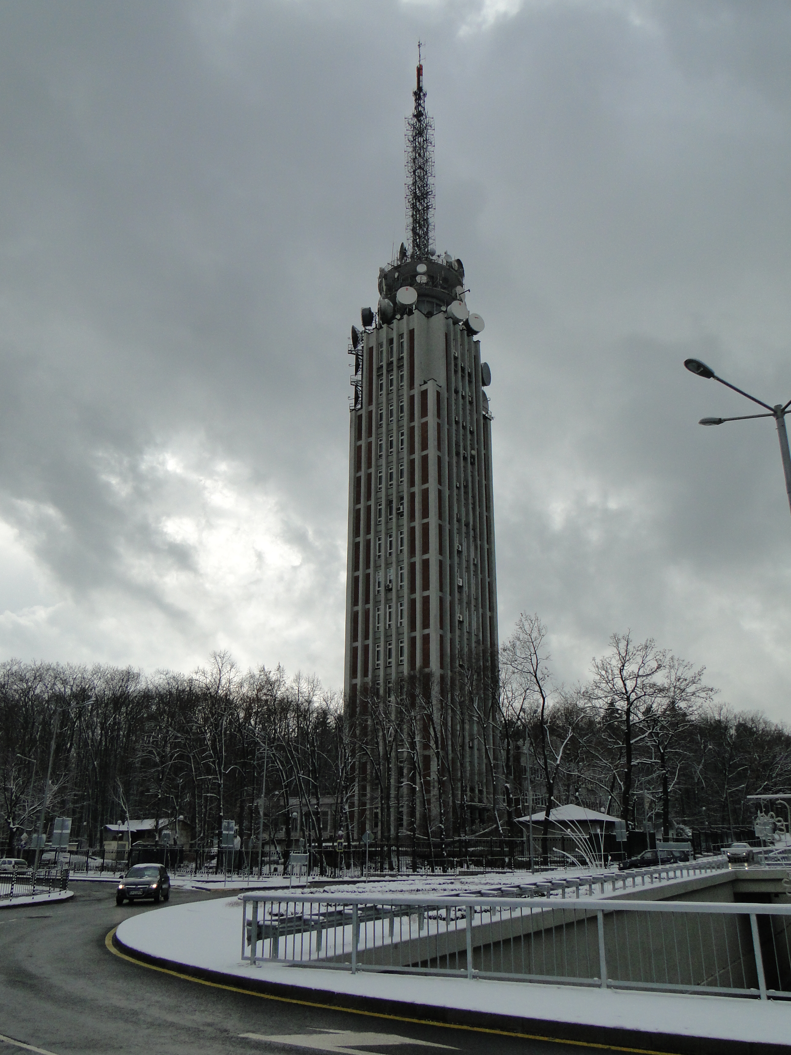 София, 19.01.2013 - Sofia